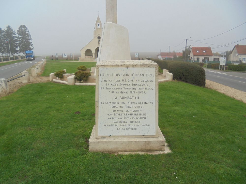 Monument à Cerny en Laonnois rendant hommage aux troupes du 38e DI qui se sont battues au Chemin des Dames: RICM 4e Zouaves, 4e Mixte Zouaves Tirailleurs Tunisiens, 8e régiment des tirailleurs tunisiens, 32e RAC, compagnies du génie 19/2 - 19/52